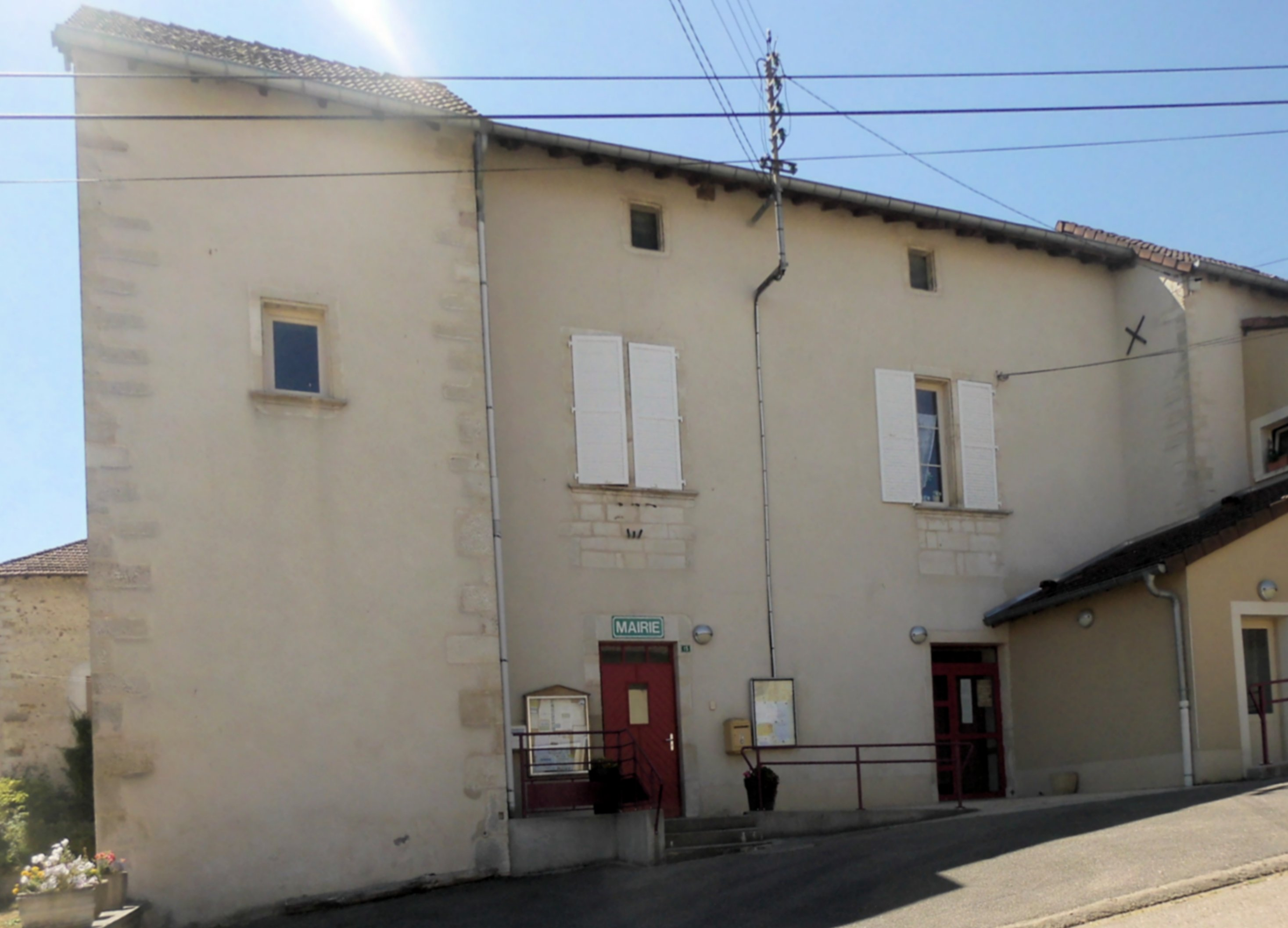 La mairie de Jubainville